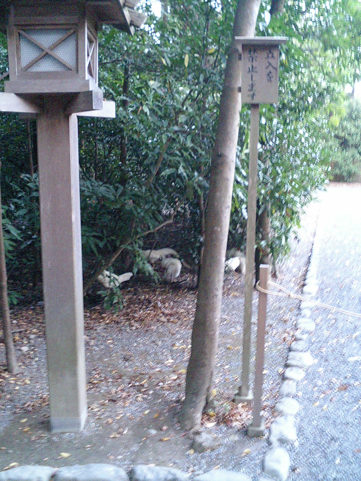 神宮内宮・神鶏 2005年11月16日に参詣。